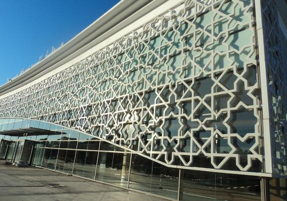 rabat